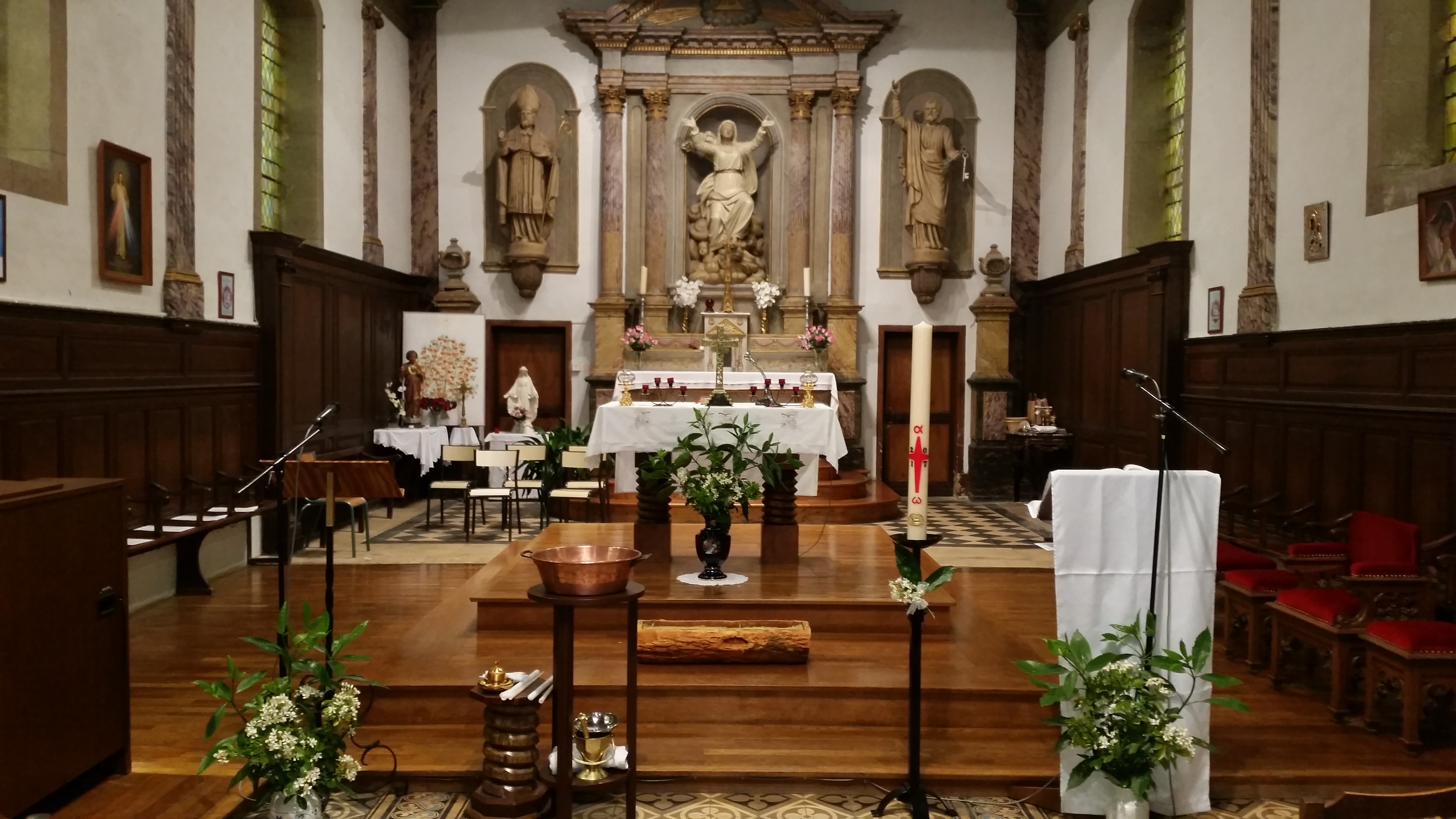 Maître-autel. Statues de Saint-Firmin, de l'Assomption et de Saint-Pierre.